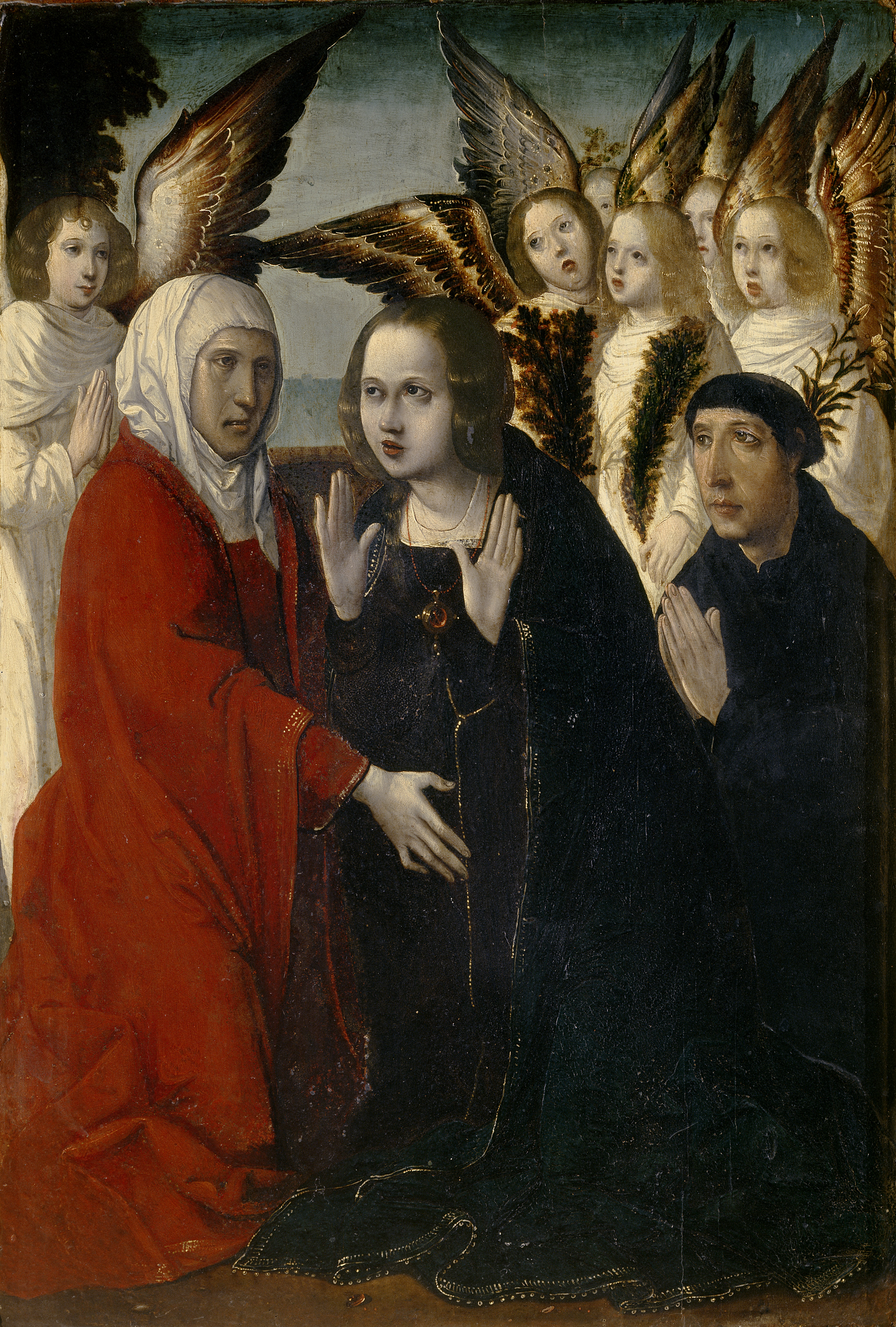 La obra representa a la Virgen María, que estaba embarazada del Niño Jesús, visitando a su prima Santa Isabel, que lo estaba a su vez del futuro profeta San Juan Bautista.